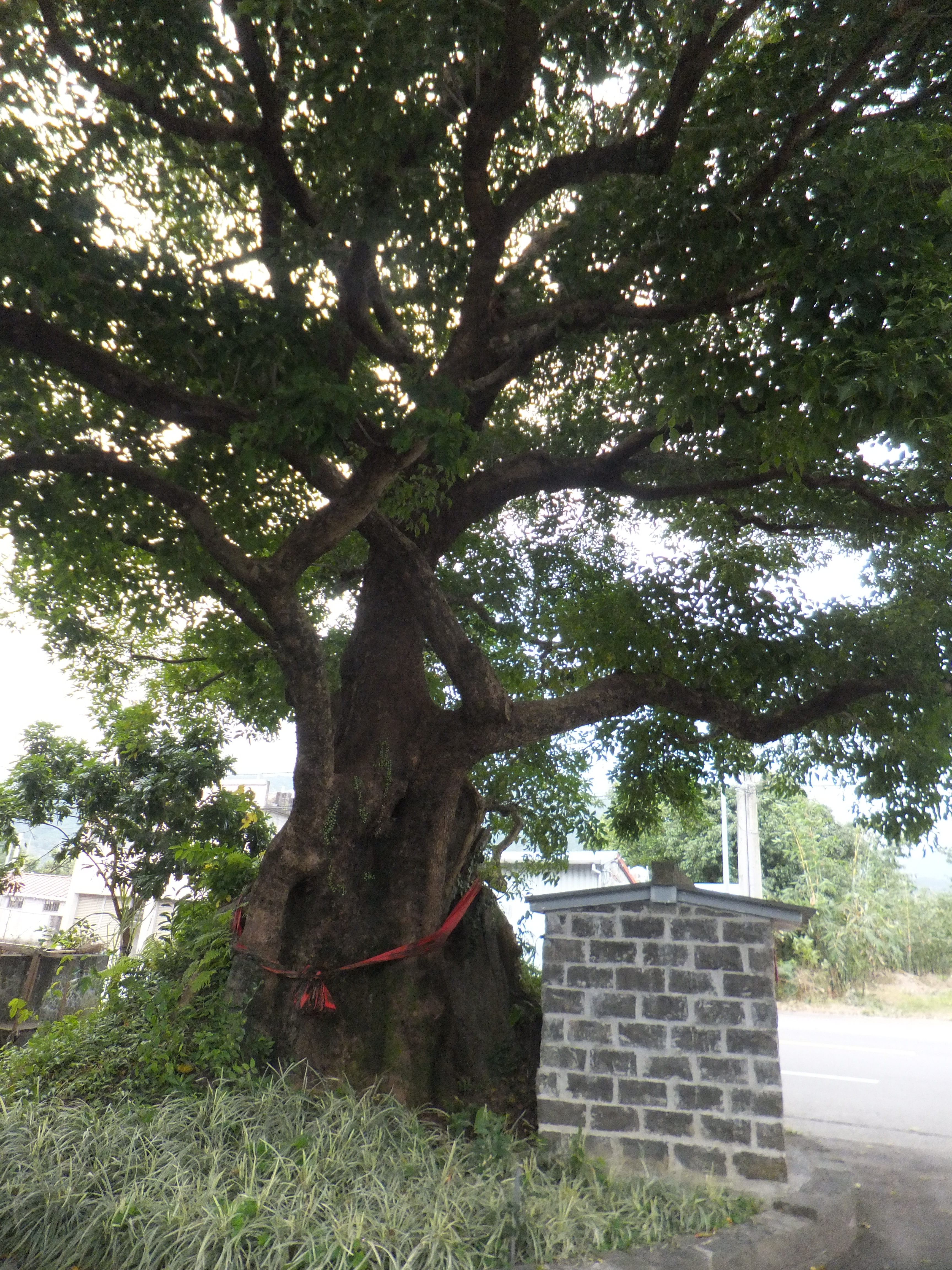 中文（台灣）: 宜蘭縣員山鄉結頭份的大樹公